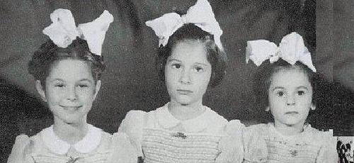 الاميرات فريال وفوزية وفادية بنات الملك فاروق والملكة فريدة